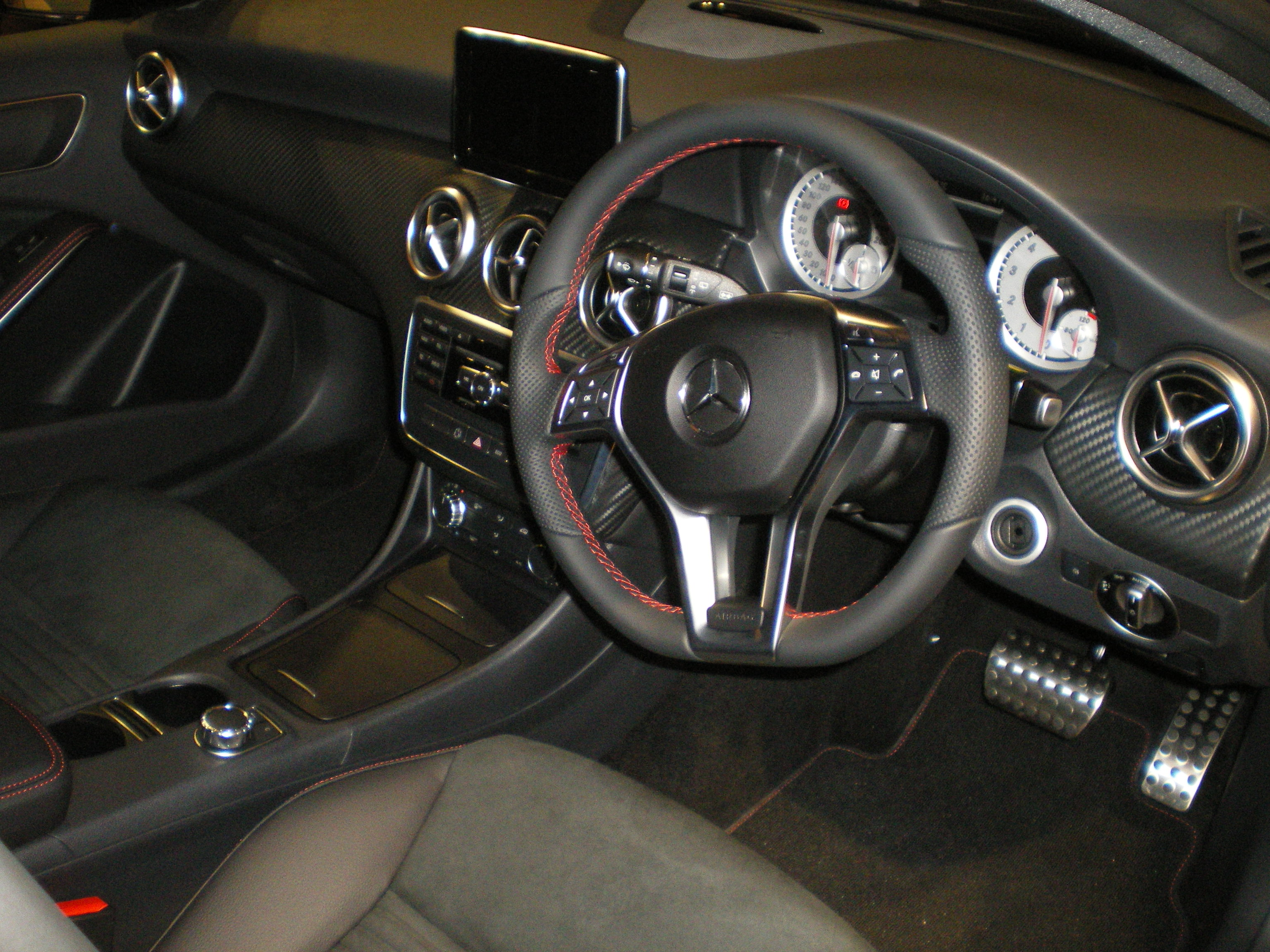 メルセデス・ベンツ Aクラス